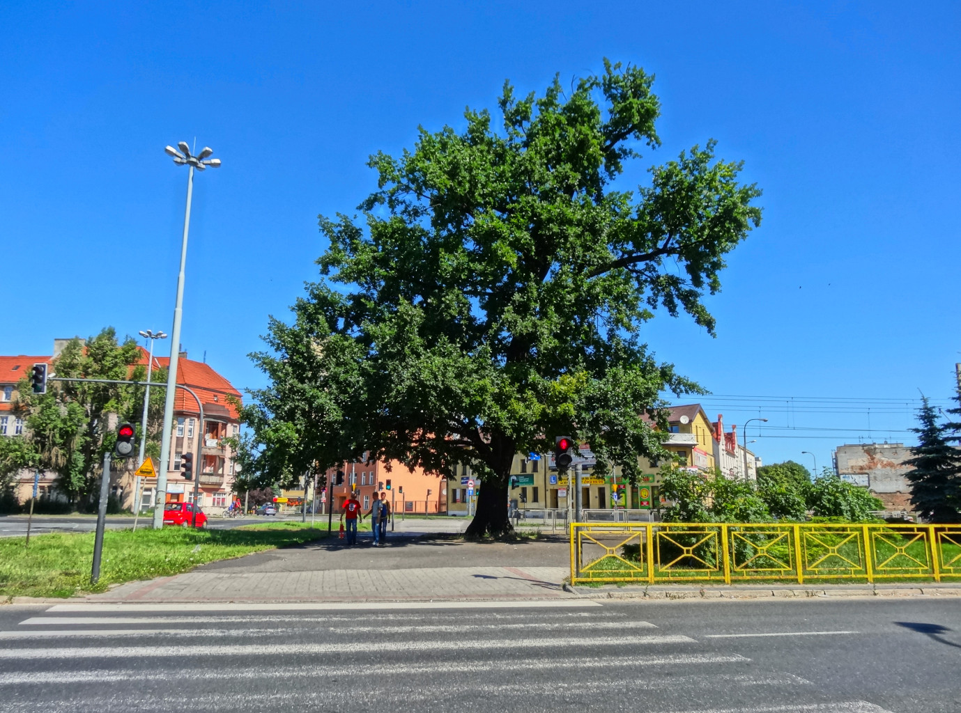 Dąb - pomnik przyrody na rondzie Grunwaldzkim w Bydgoszczy